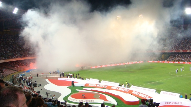 Palco della premiazione del trofeo Birra Moretti allo Stadio S. Paolo di Napoli